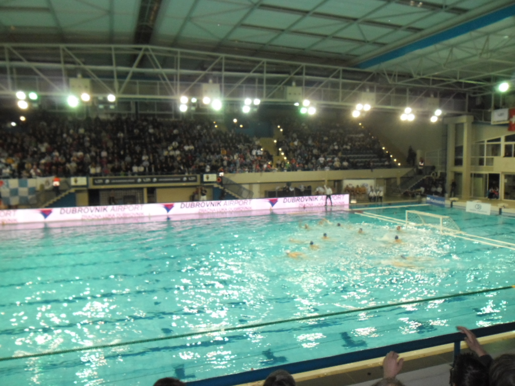 prizor s vaterpolske euroligaške utakmice Jug - Pro Recco (8:7) u Dubrovniku 29. siječnja 2014.